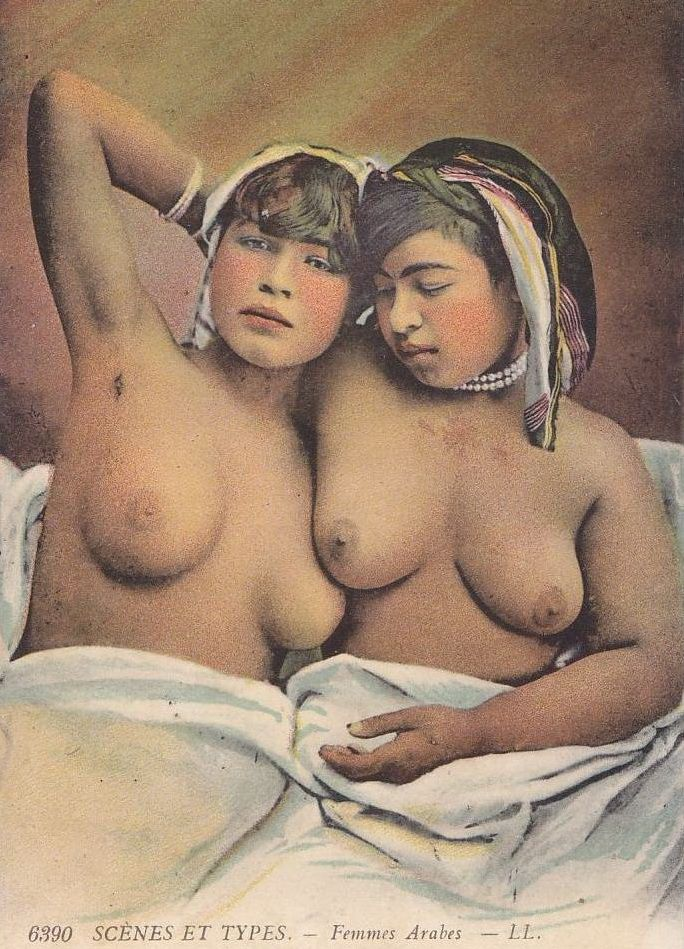 Levy & Fils postcard